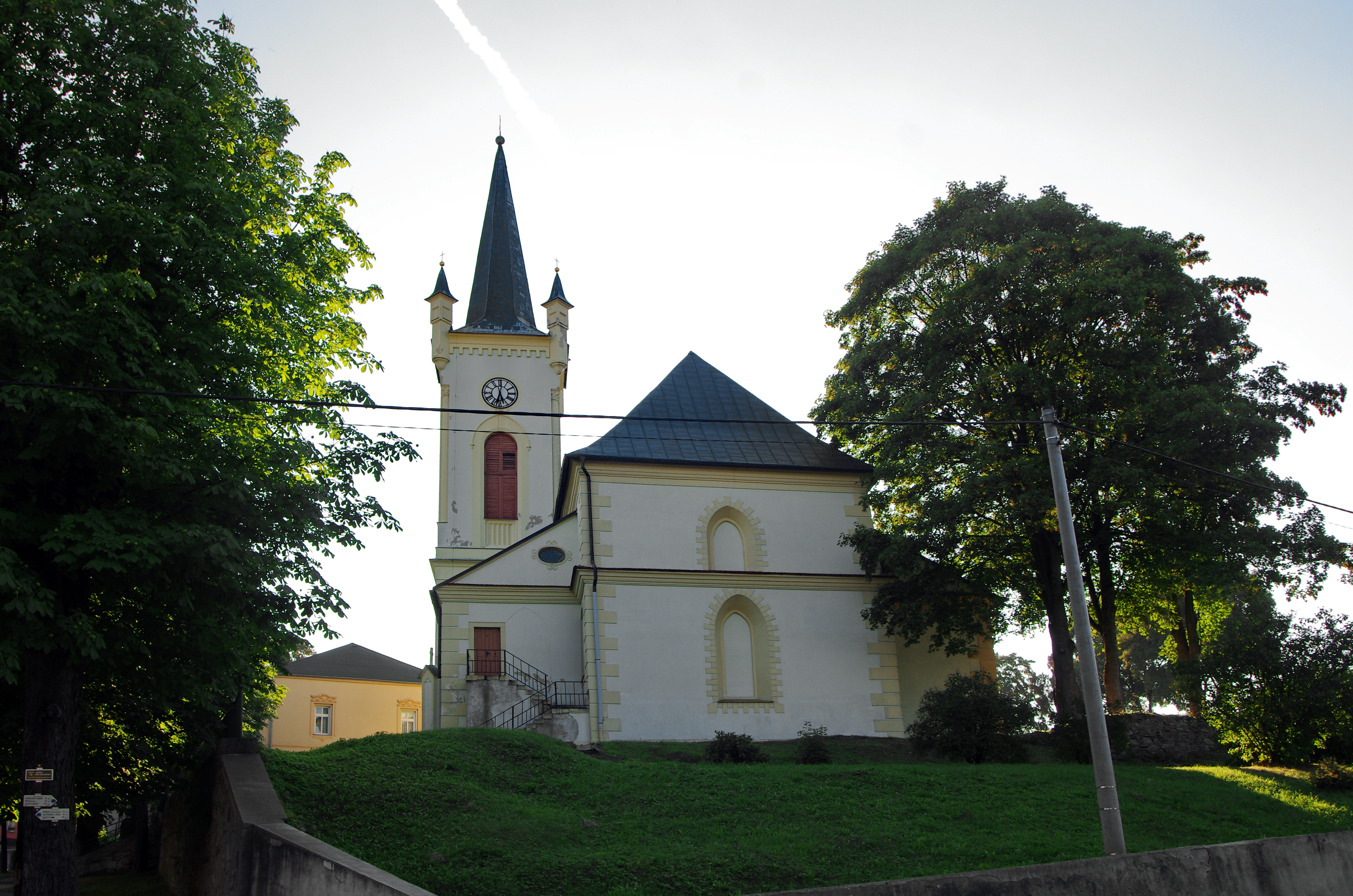 Kostel svatých Petra a Pavla, náměstí Karla IV., Krajková.